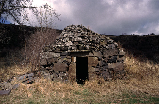 Cabane en pierre sèche au lieudit Les Vigneaux à Vals-près-le-Puy (Haute-Loire). Photo de Christian Lassure.